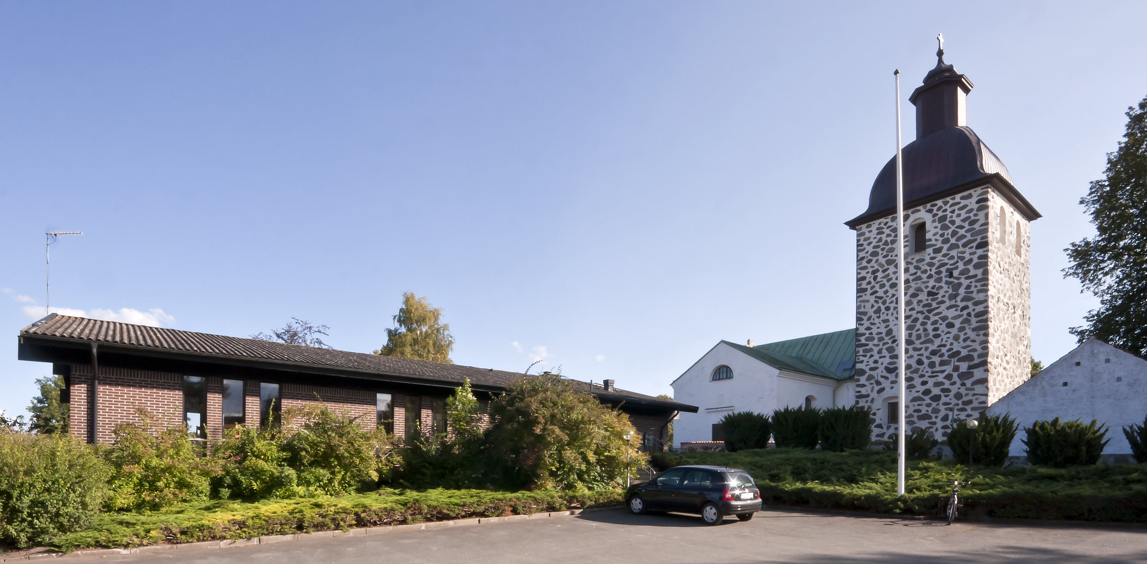 Gustav Adolfs kyrka med tillhörande församlingshem i Viby utanför Kristianstad.